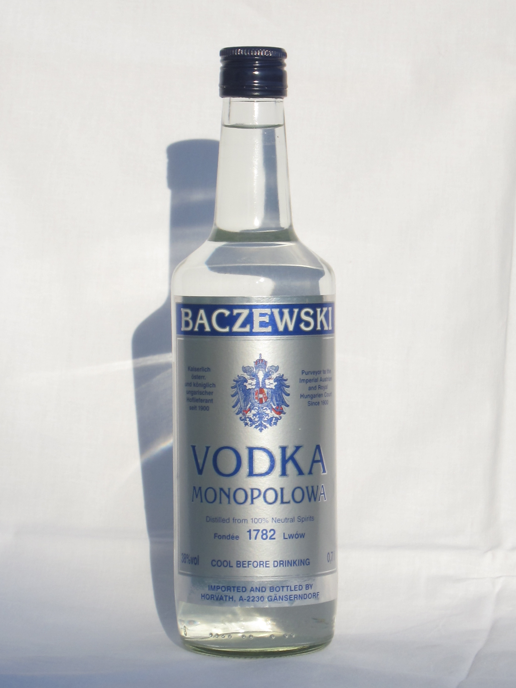 Русская водка Хлебная Слеза